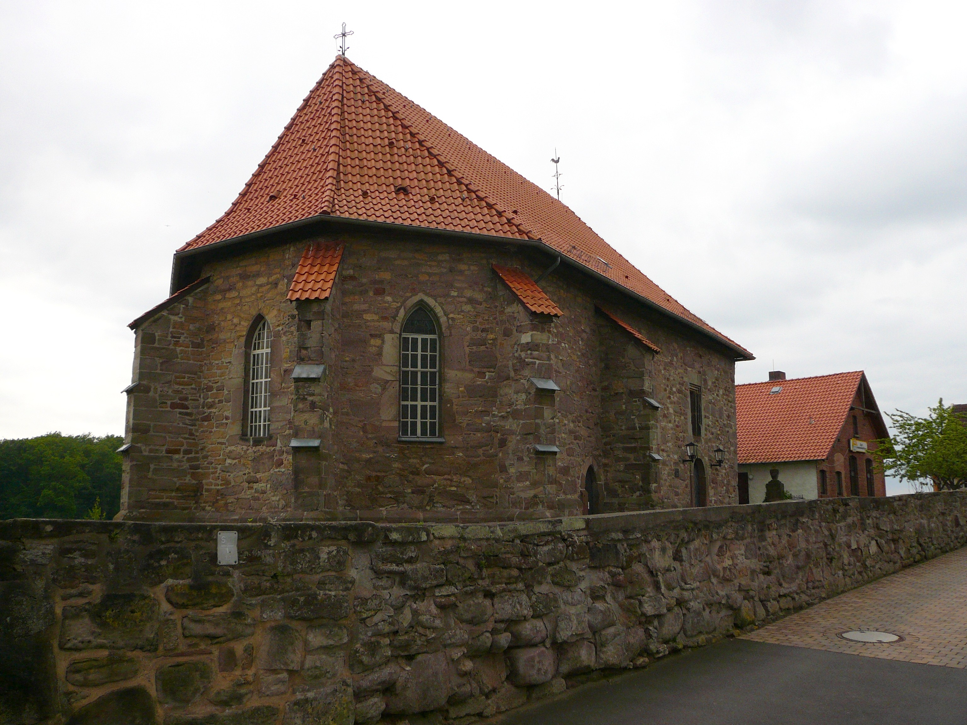 Dorfkirche St. Oswald in Bühle, Stadt Northeim. Erbaut ca. um 1300